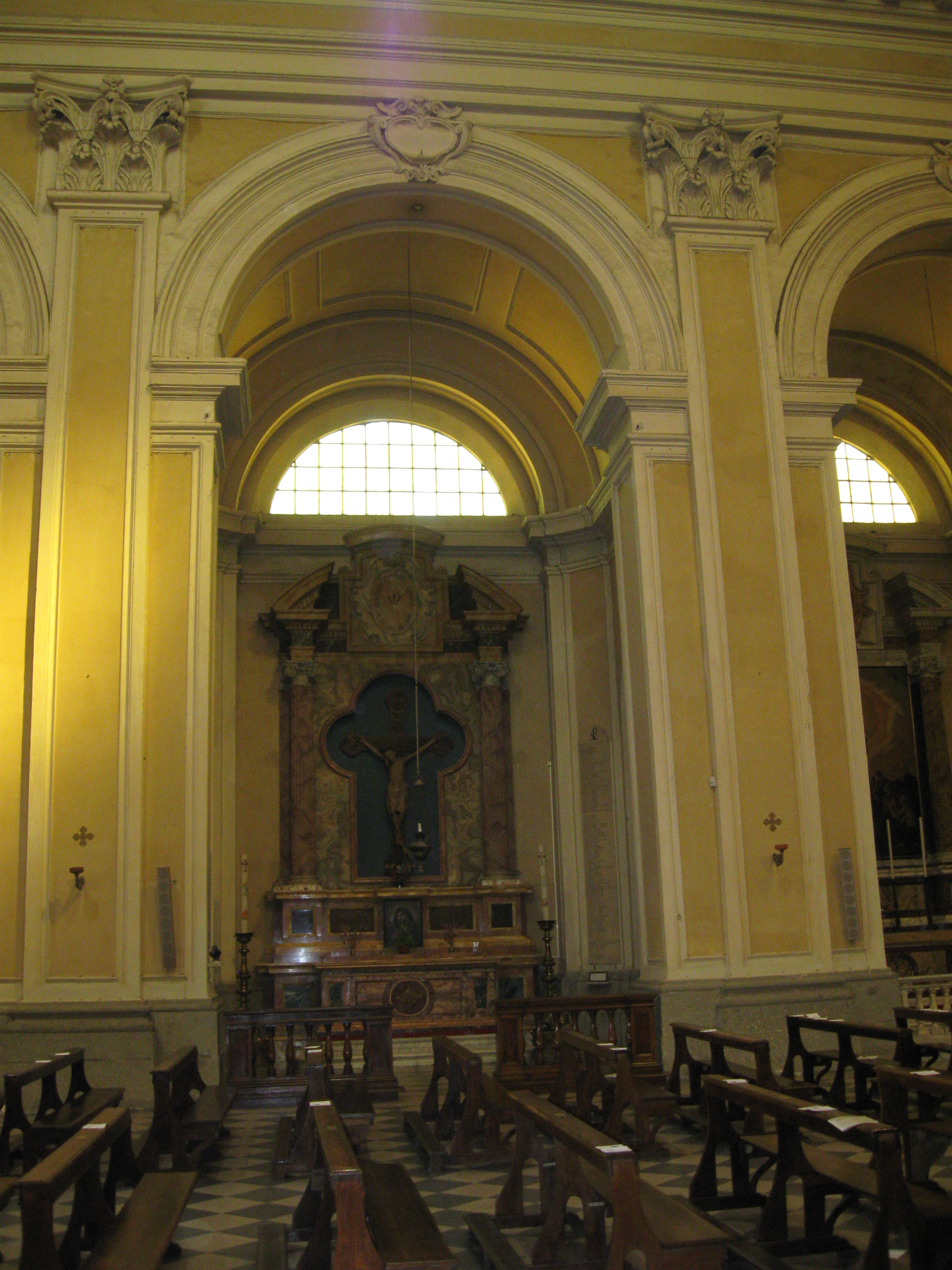 Altare del Crocifisso nella basilica di San Barnaba a Marino (RM)